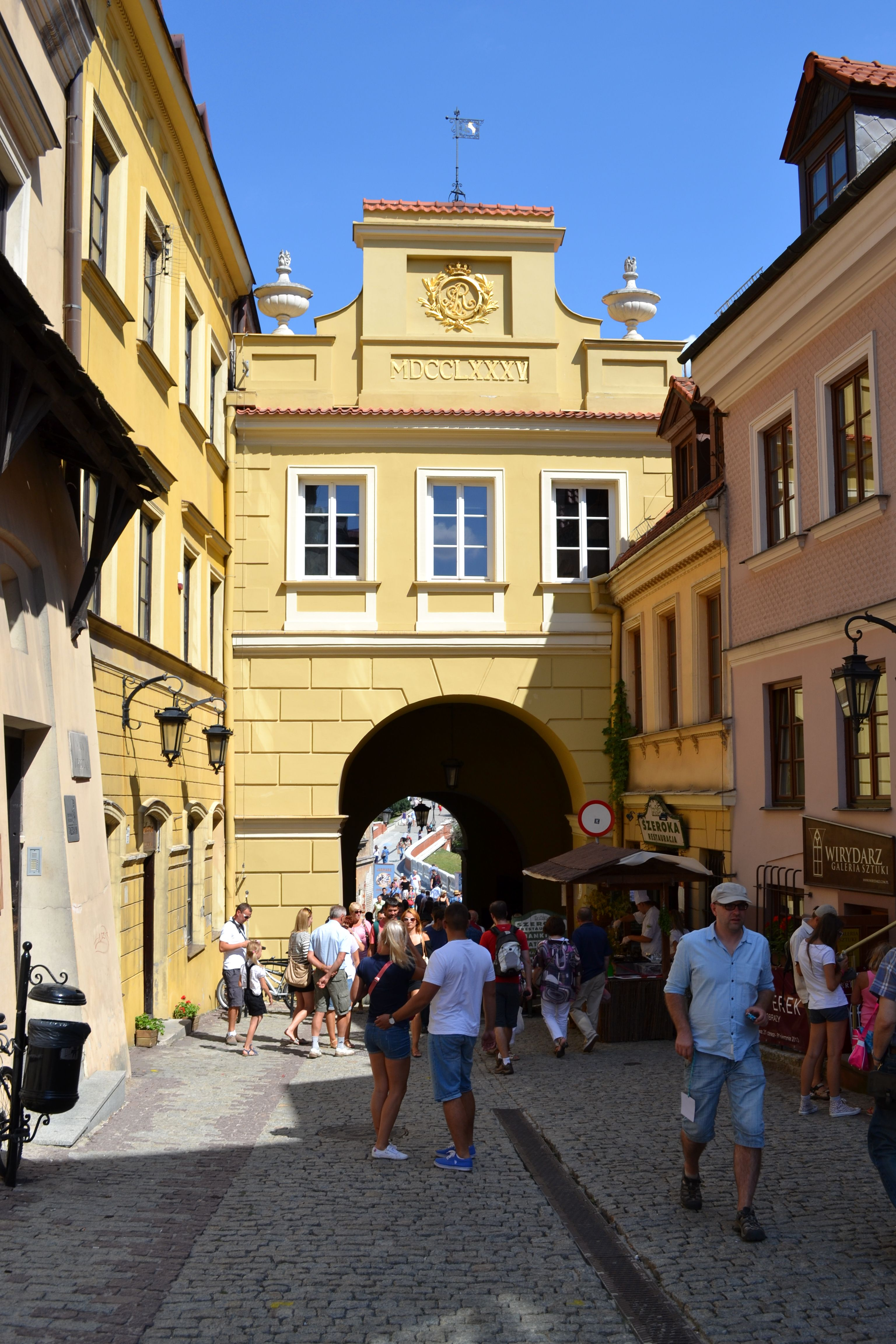 Lublin, Brama Grodzka, XIV, 1785, XX